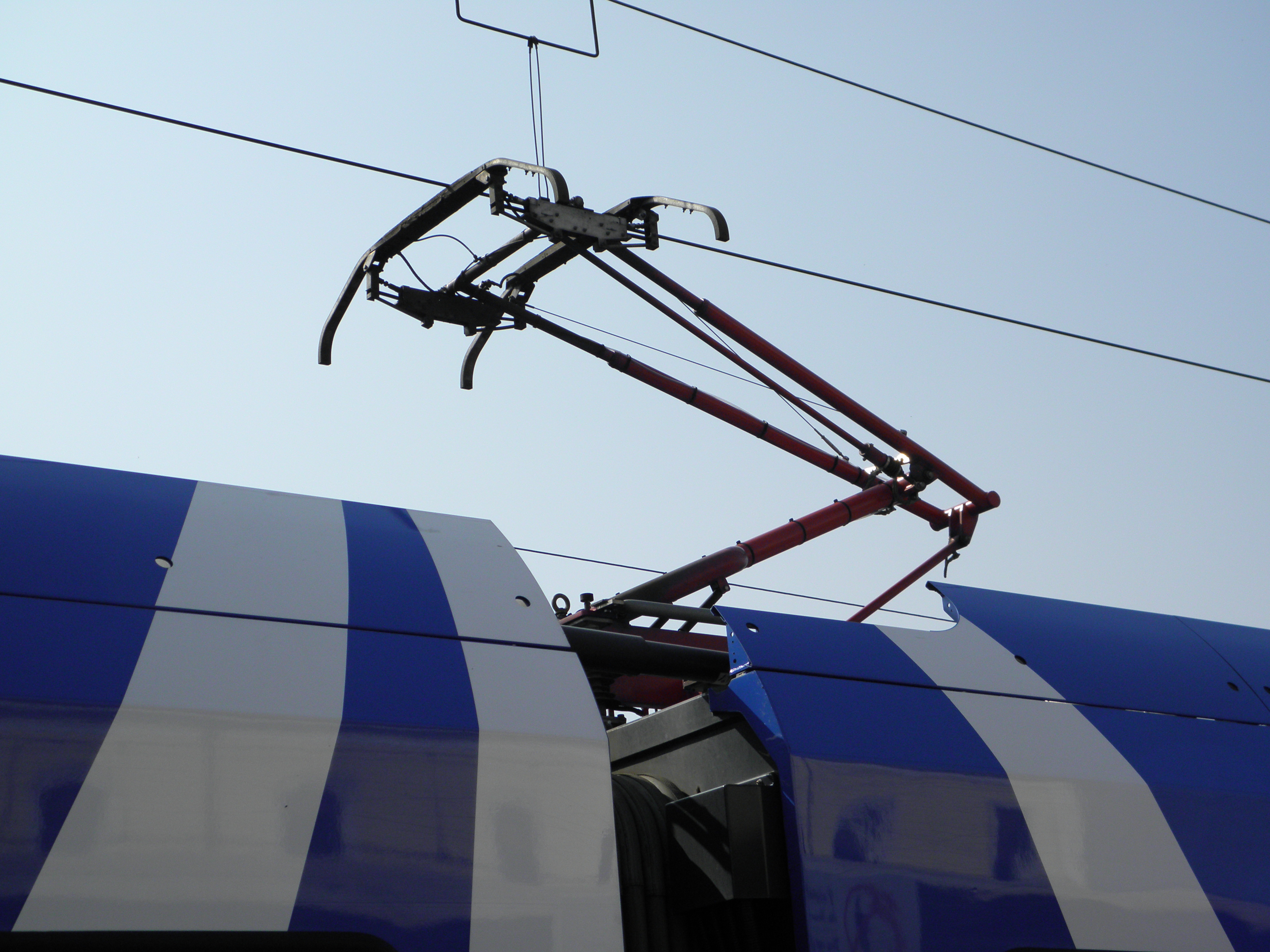 Stazione di Legnago, pantografo della FLIRT ETR 340.004 Sistemi Territoriali in sosta al binario 6.